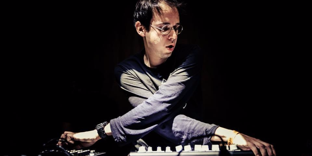 Rone live à Los Lobos - Los Angeles